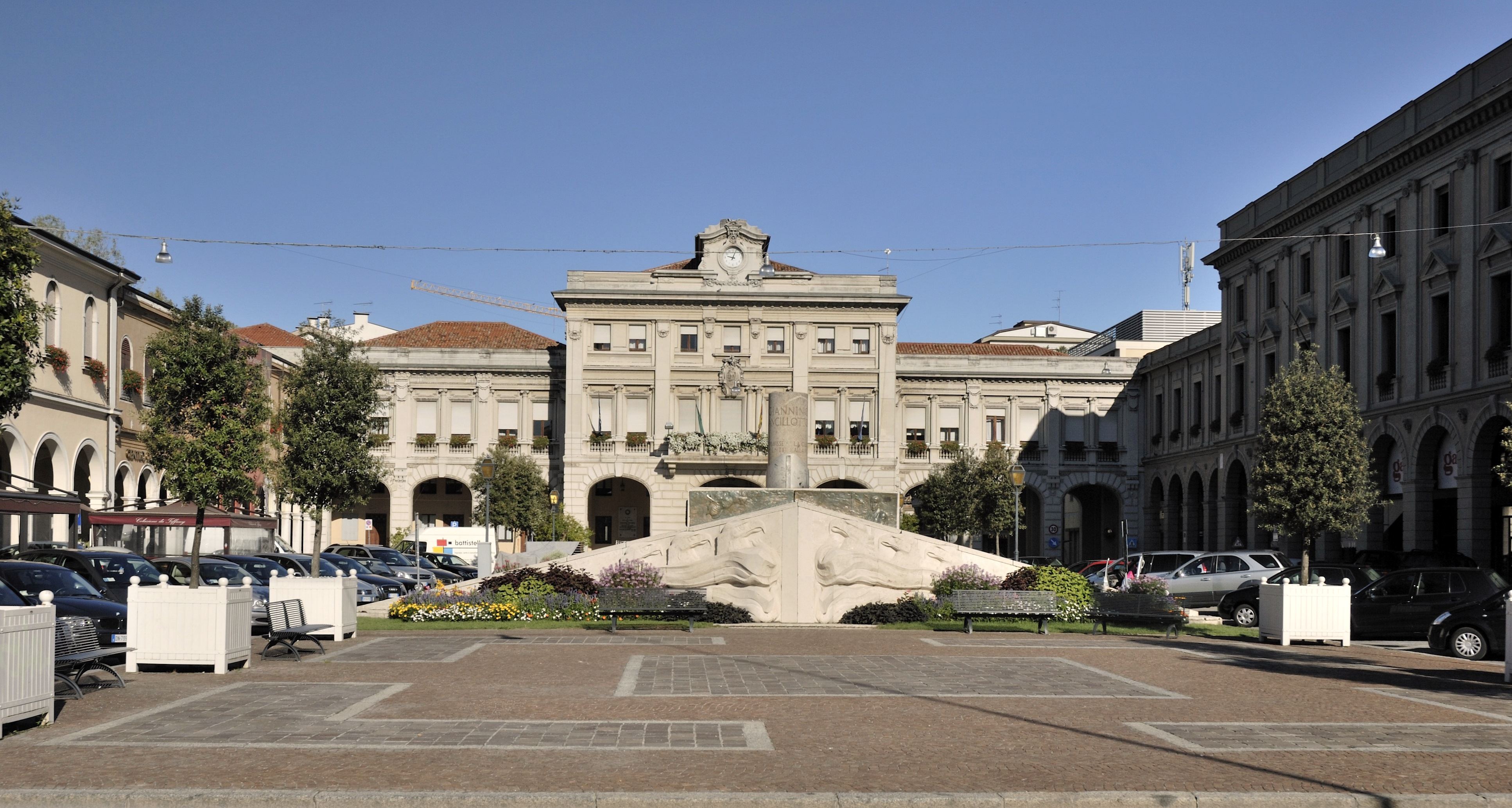 Piazza a San Donà di Piave con Municipio